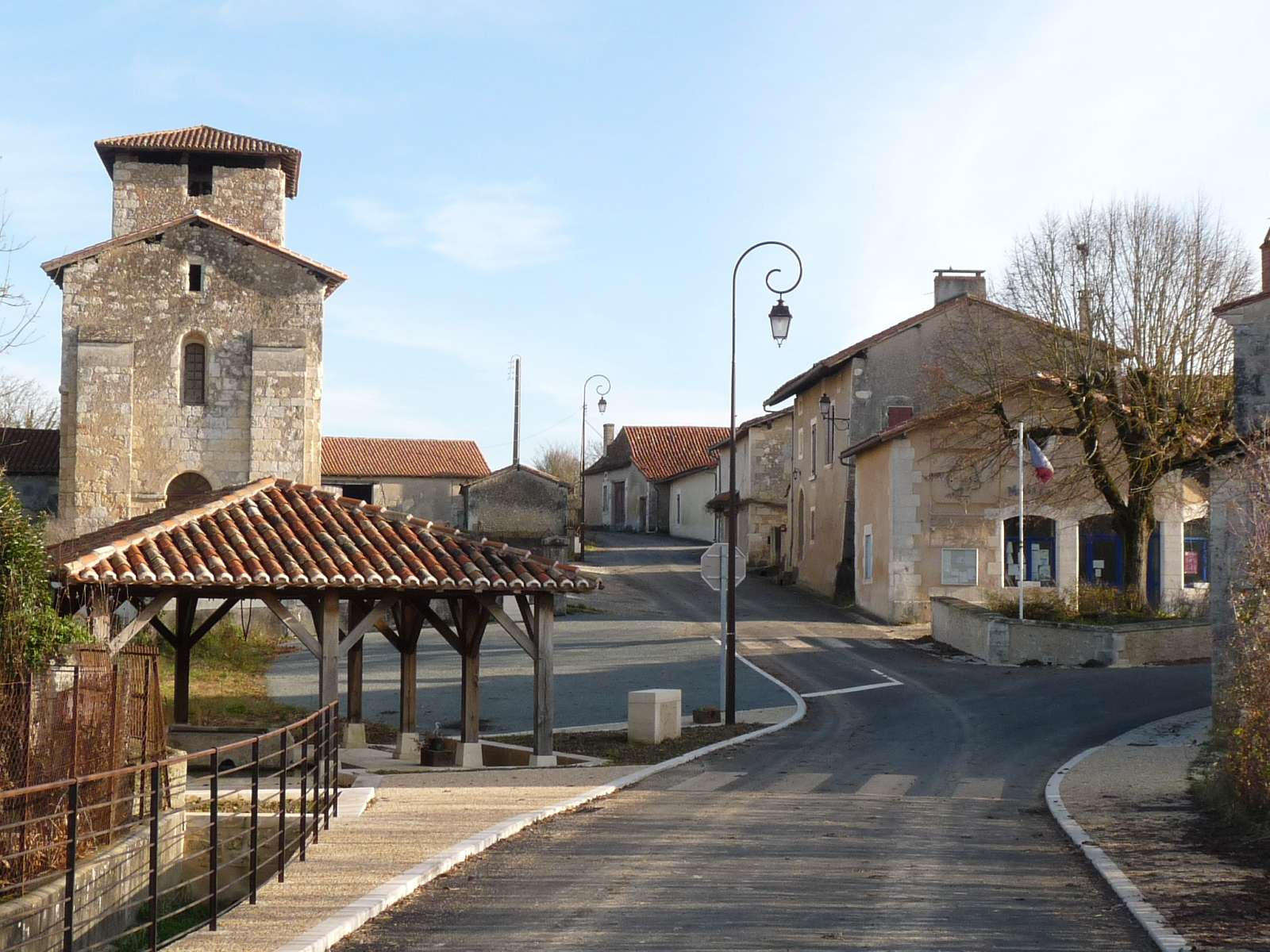 le bourg de Chassaignes, Dordogne, France